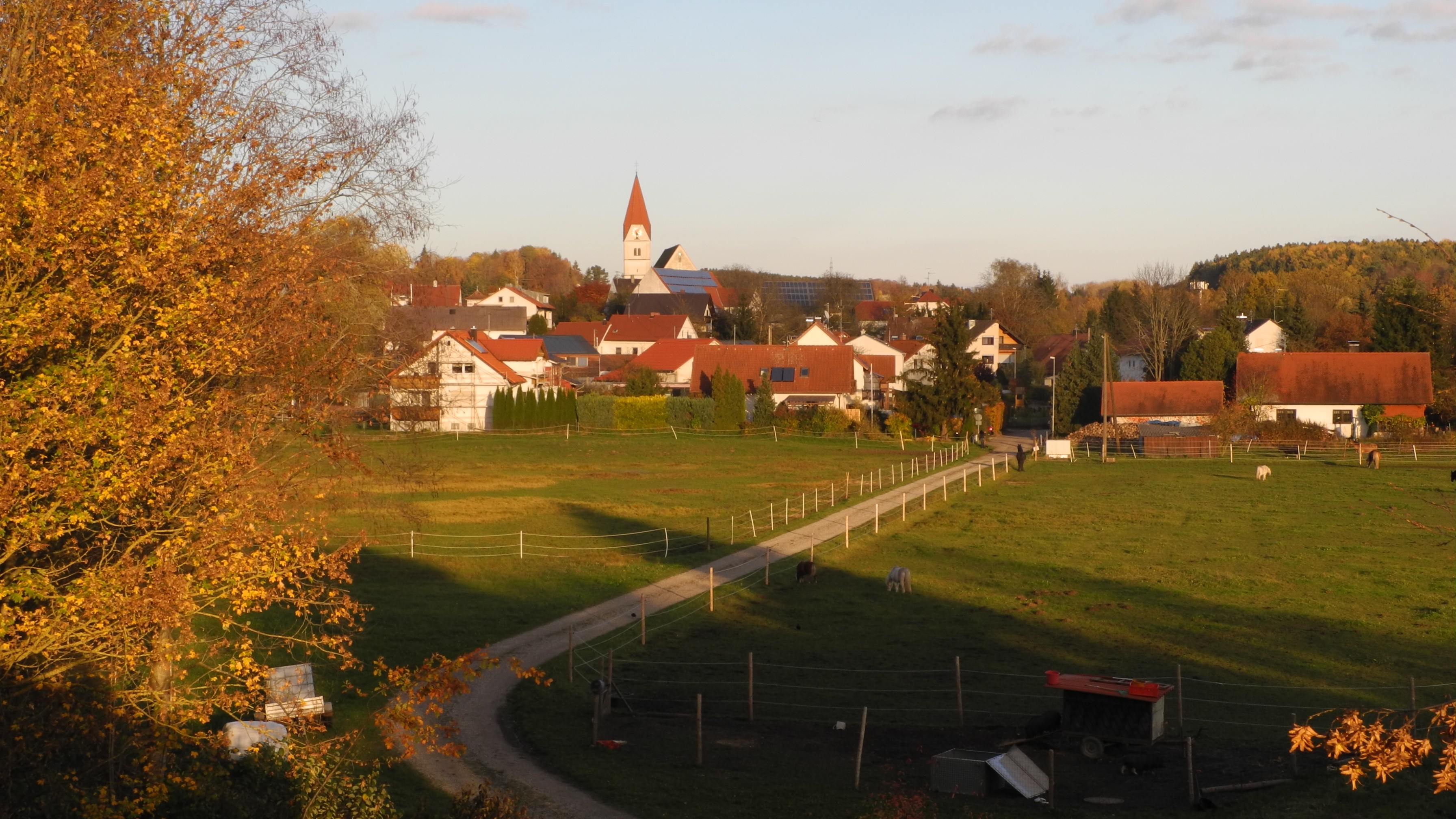 Senden - Wullenstetten von Westen, Herbst